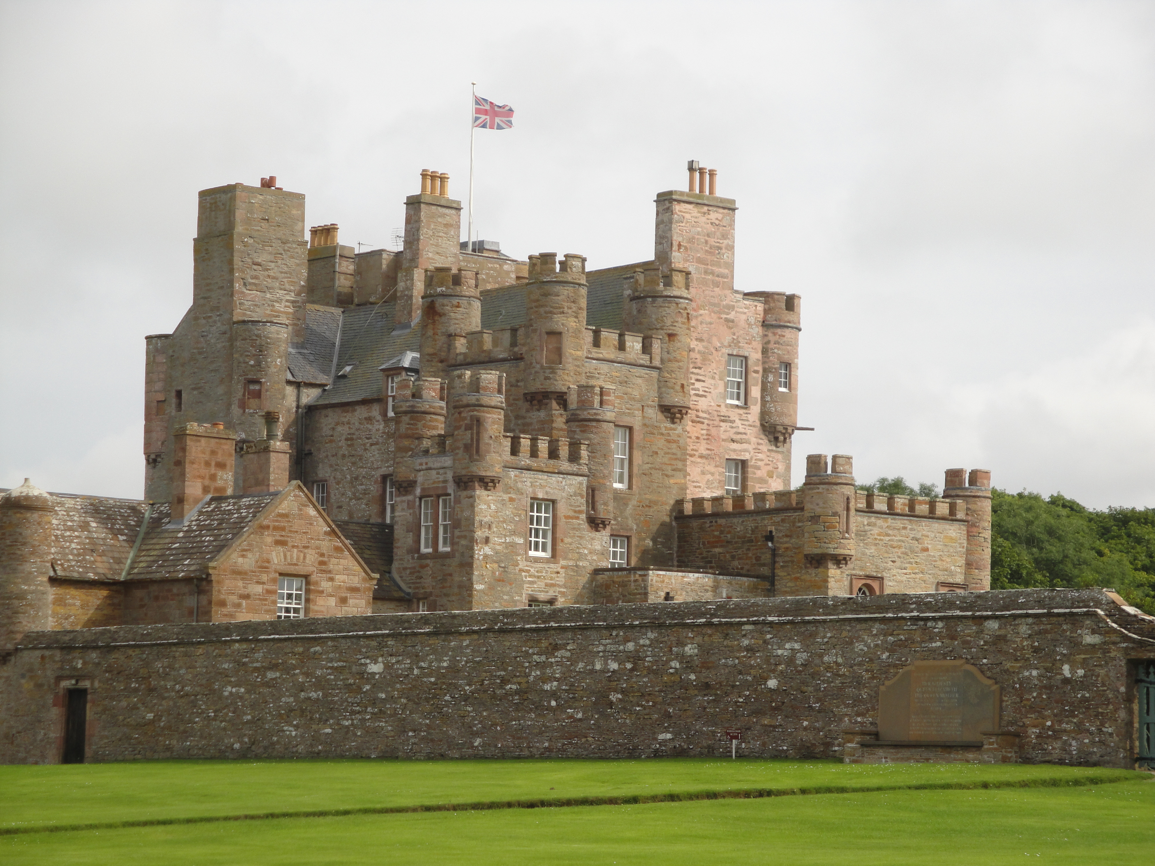 Château de Mey